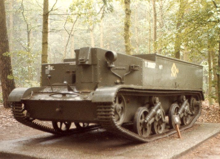 Transporter Windsor im Kriegs- und Widerstandskämpfermuseum der Niederlande (Overloon)